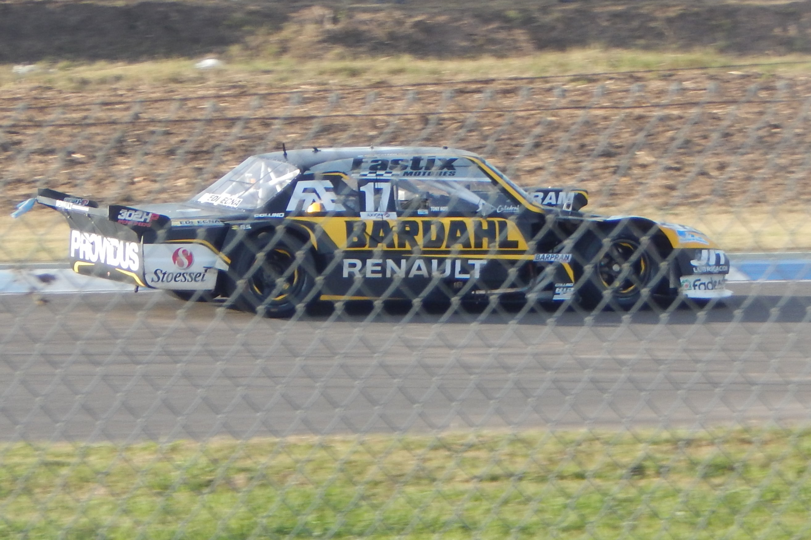 Emiliano Spataro, TC Rafaela 2019.